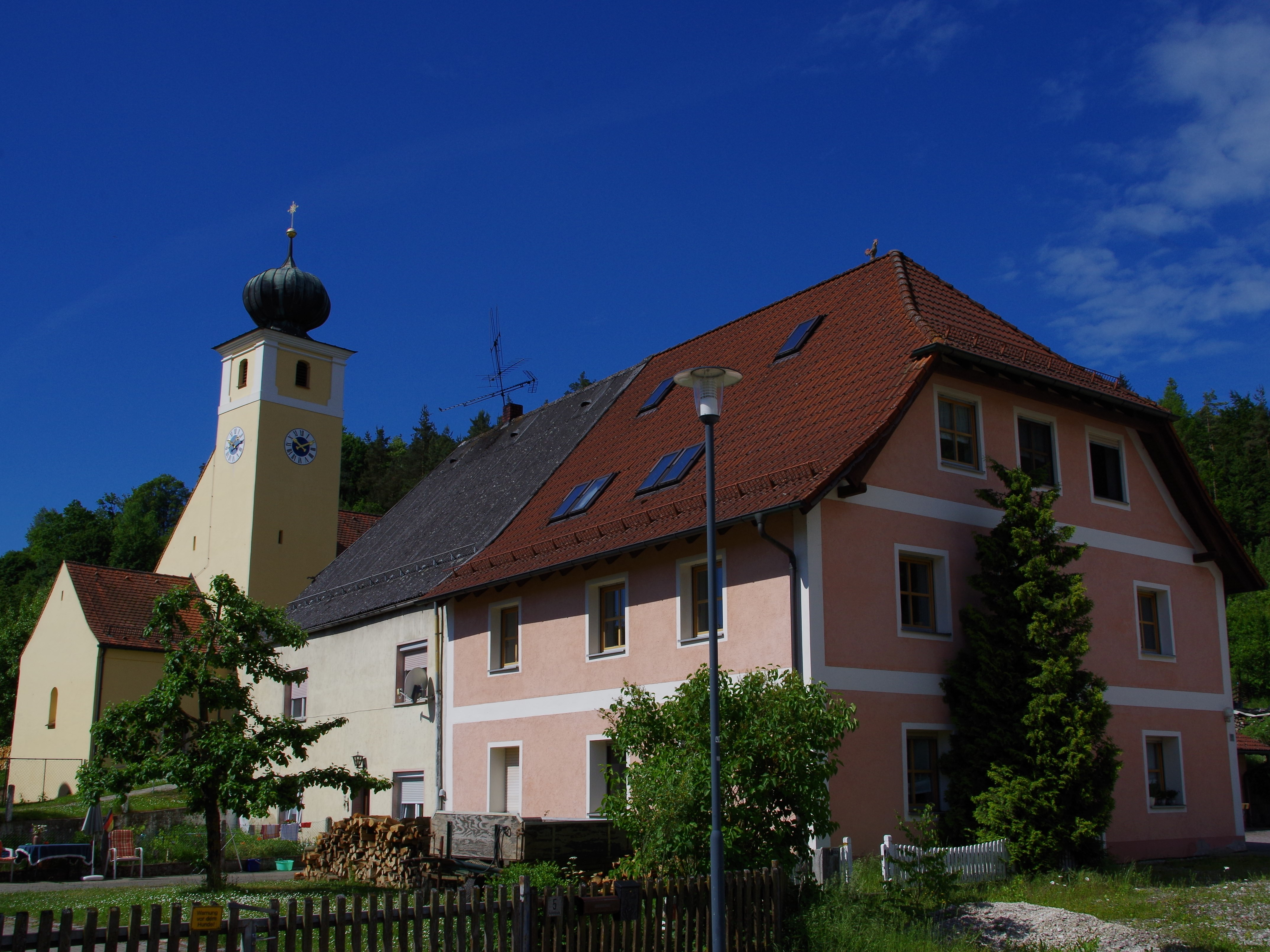 ehem. Schloss - Emhof